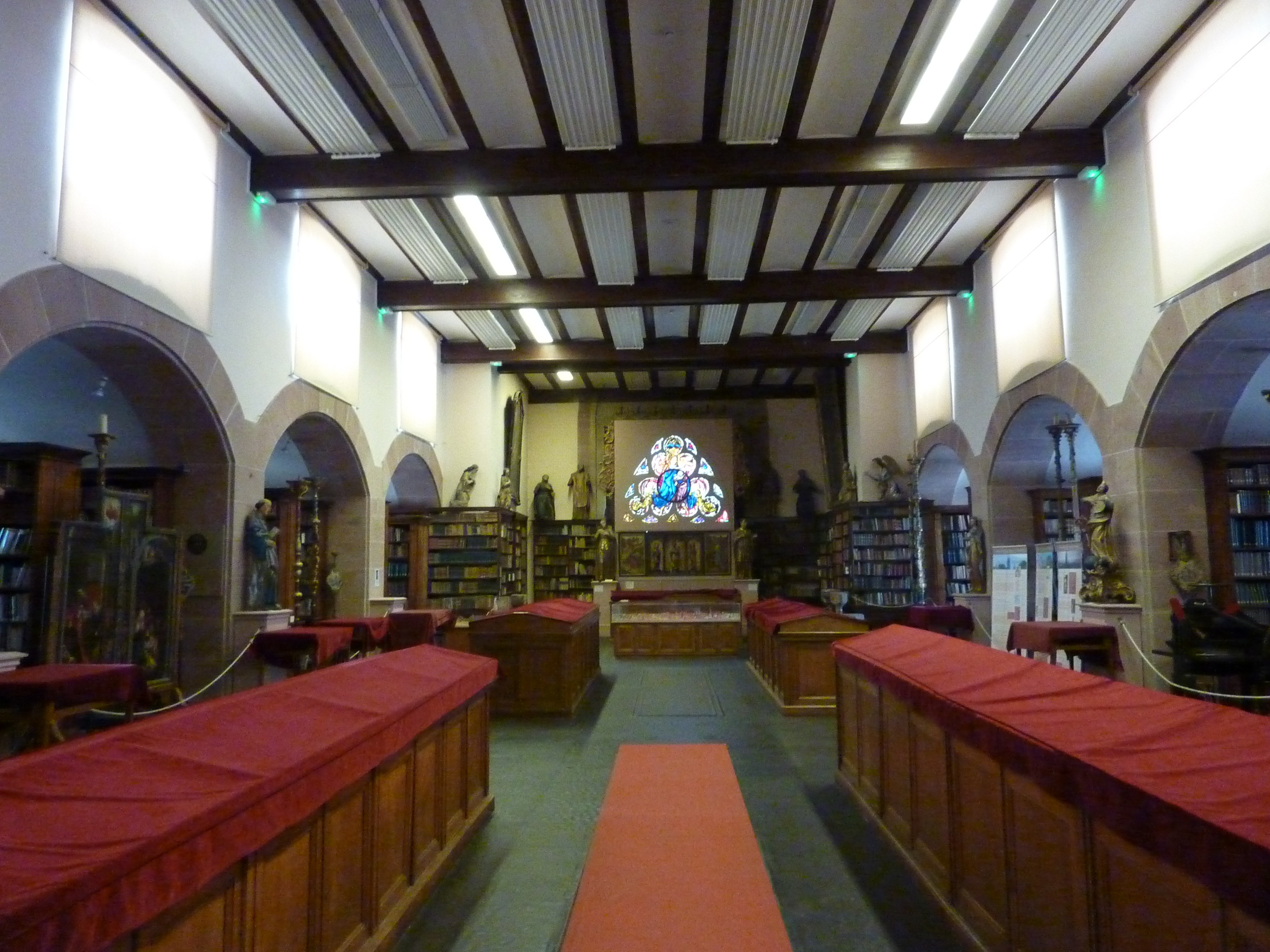 Intérieur de la Bibliothèque Humaniste de Sélestat, Bas-Rhin, France.